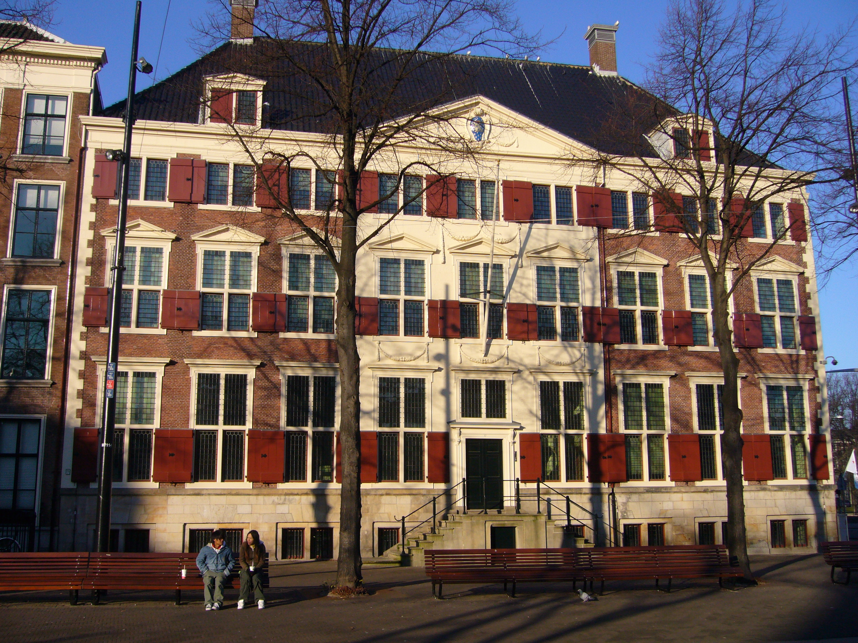 Den Haag, Buitenhof 34, Noyelles huis